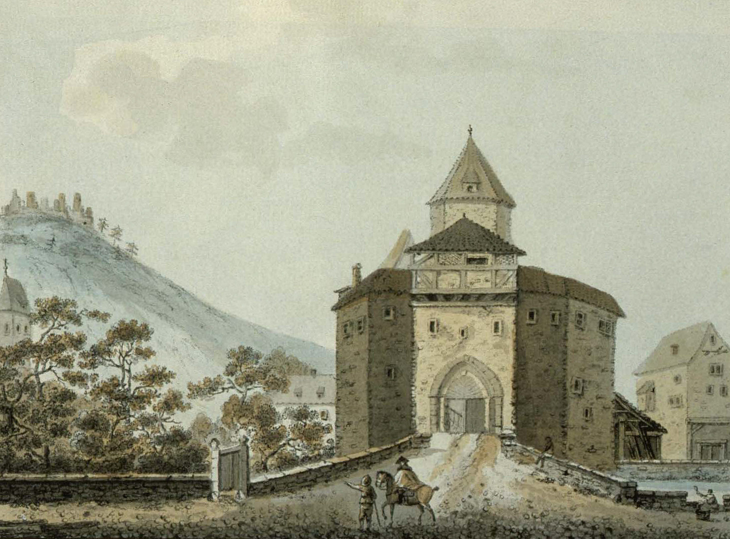 Ansicht der Burg Egisheim im 18. Jahrhundert